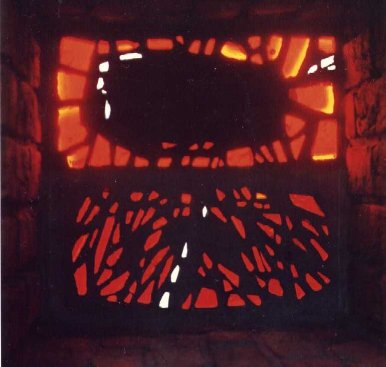 Betonglasfenster in der Matthäuskirche Hagen